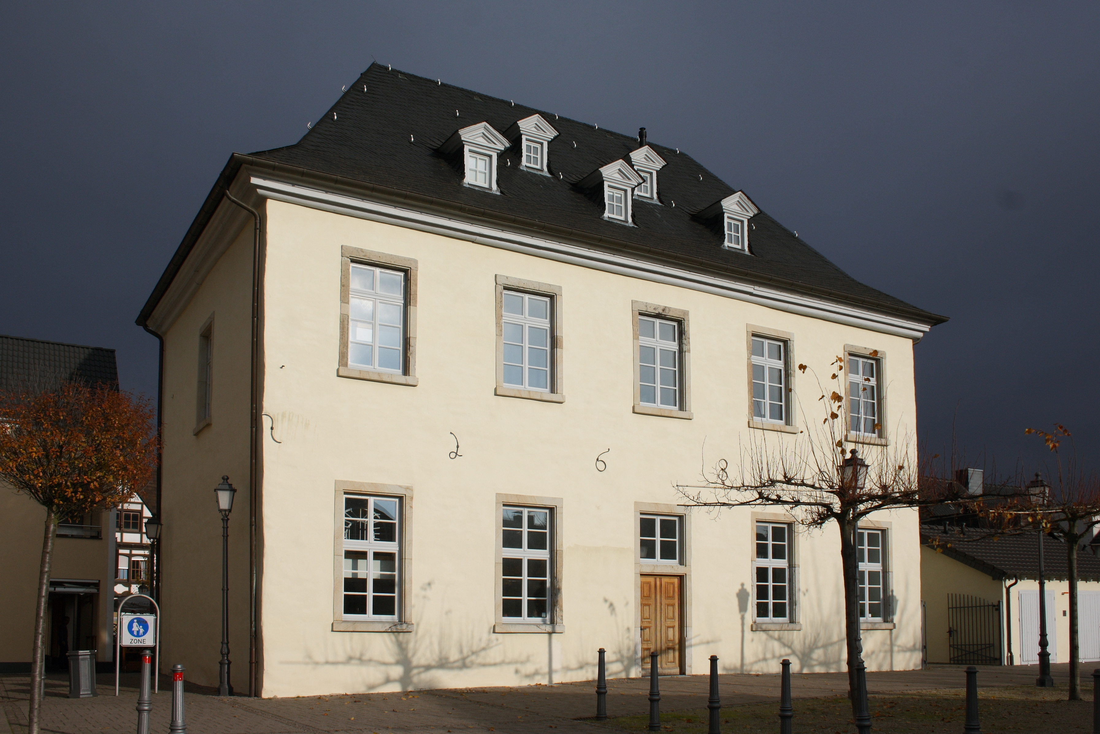 Blankartshof in Ahrweiler, einem Stadtteil von Bad Neuenahr-Ahrweiler (Rheinland-Pfalz), ehemaliger Hof der Adelsfamilie Blankart von Ahrweiler, 1680 erbaut